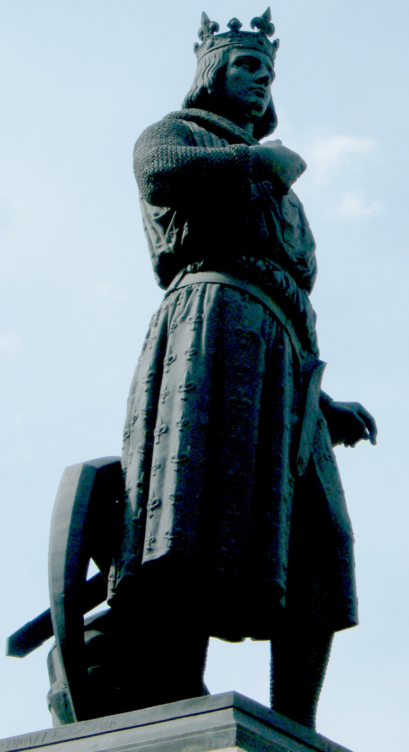 Ludwig IX. Statue in der Ortsmitte von Aigues-Mortes (Camargue, Südfrankreich)